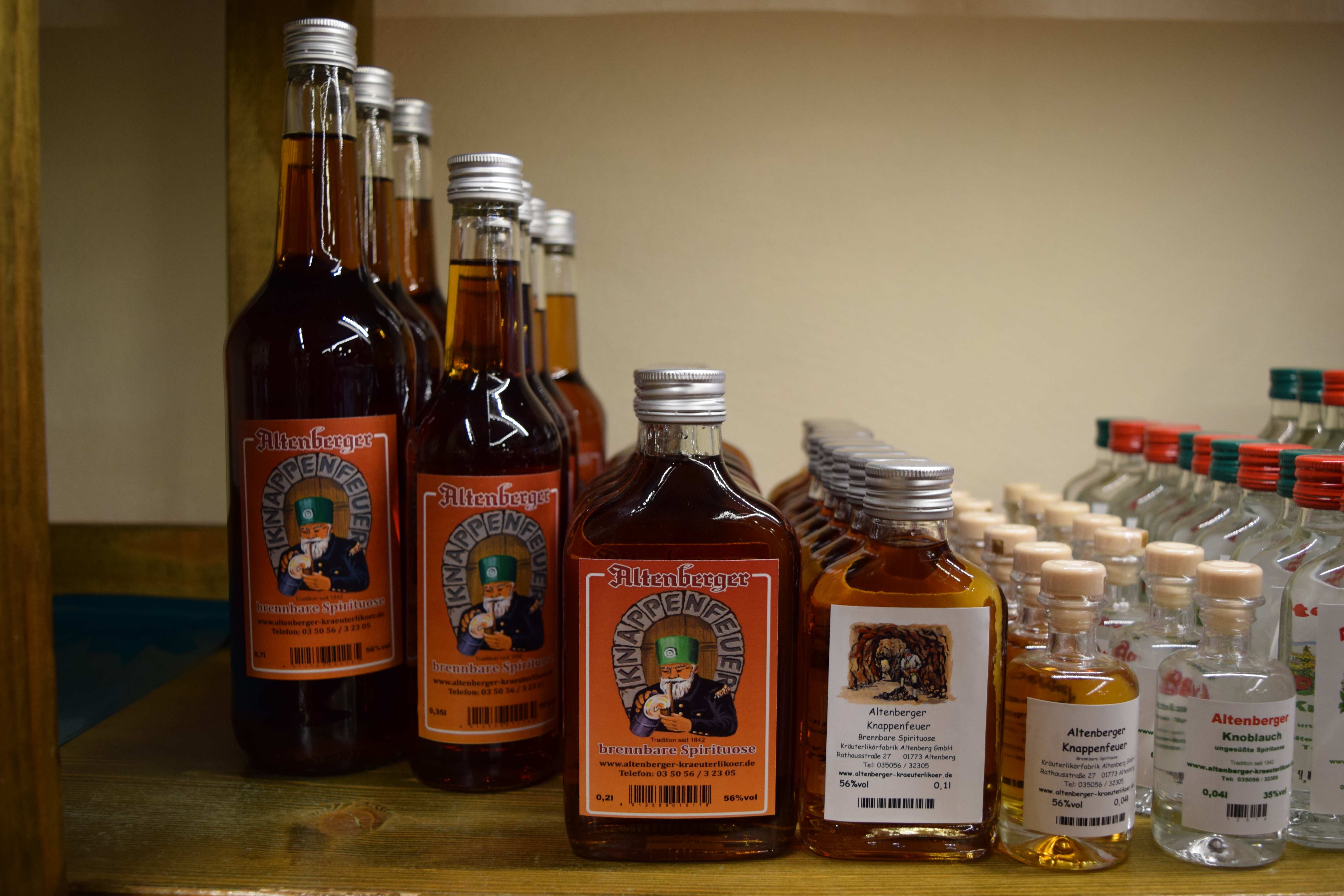 Altenberger Knappenfeuer